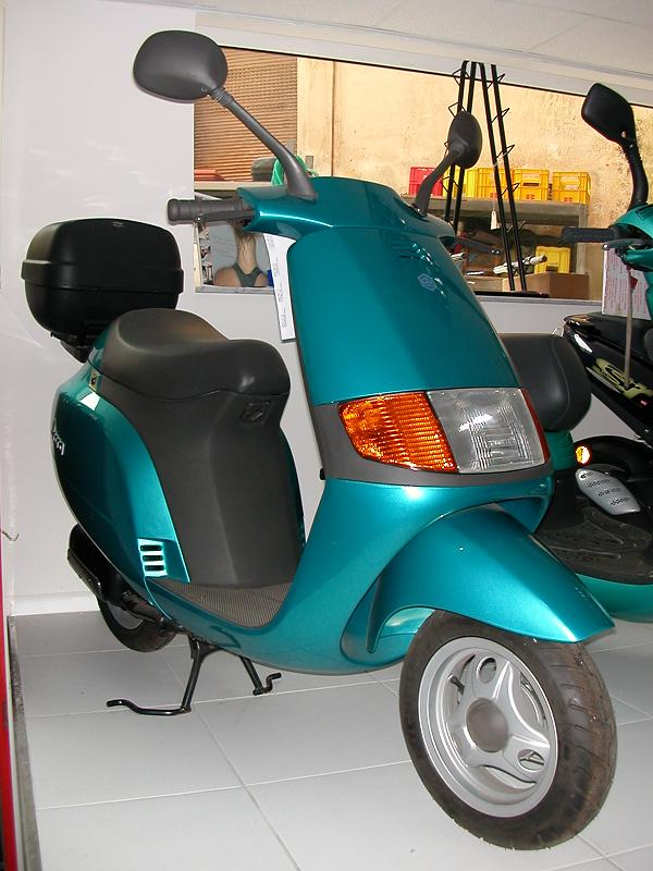 immagine Piaggio Sfera prima serie